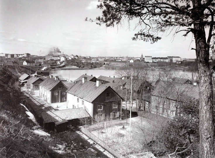 Fredriksdal near Hammarby gård, in Södra Hammarbyhamnen, Stockholm